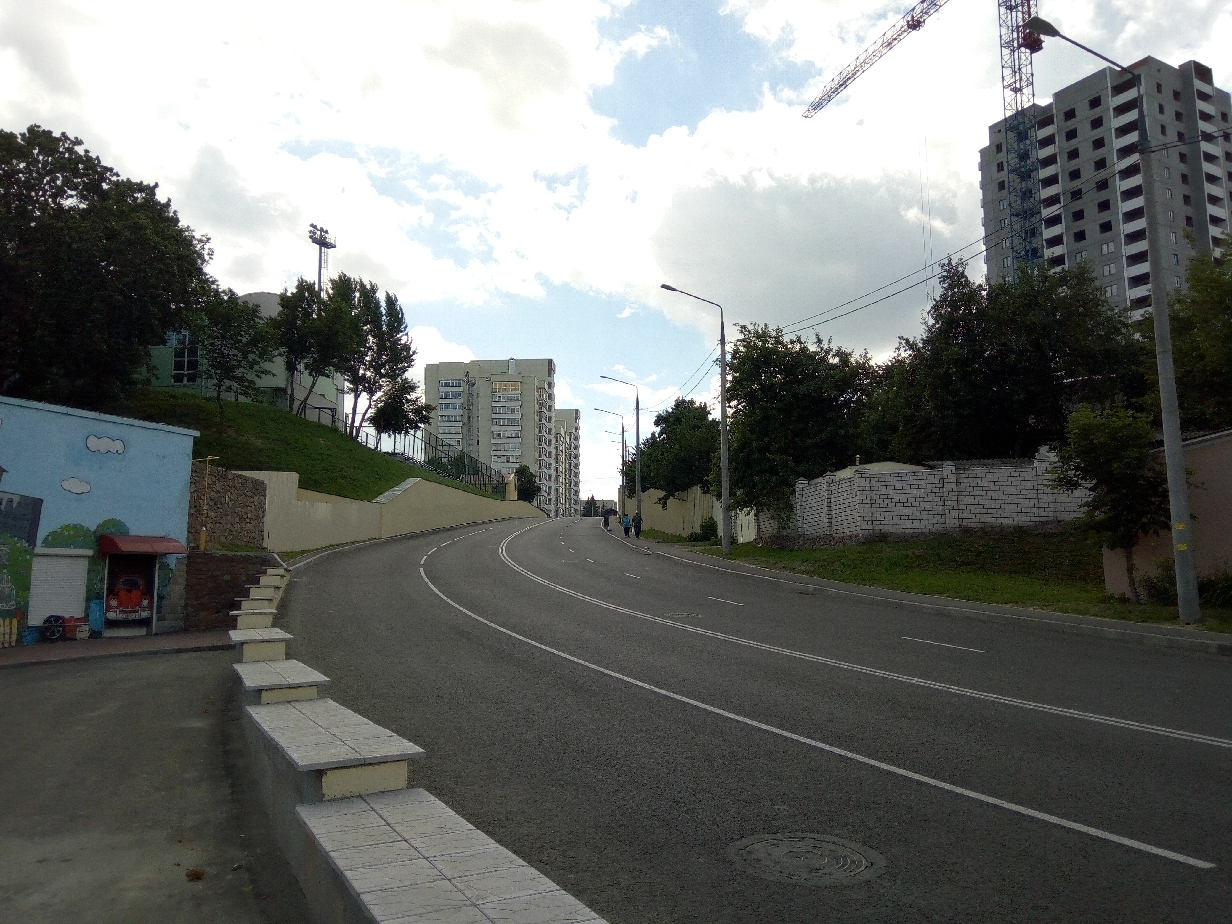 Валатаўскі спуск (Гомель), 2018 год